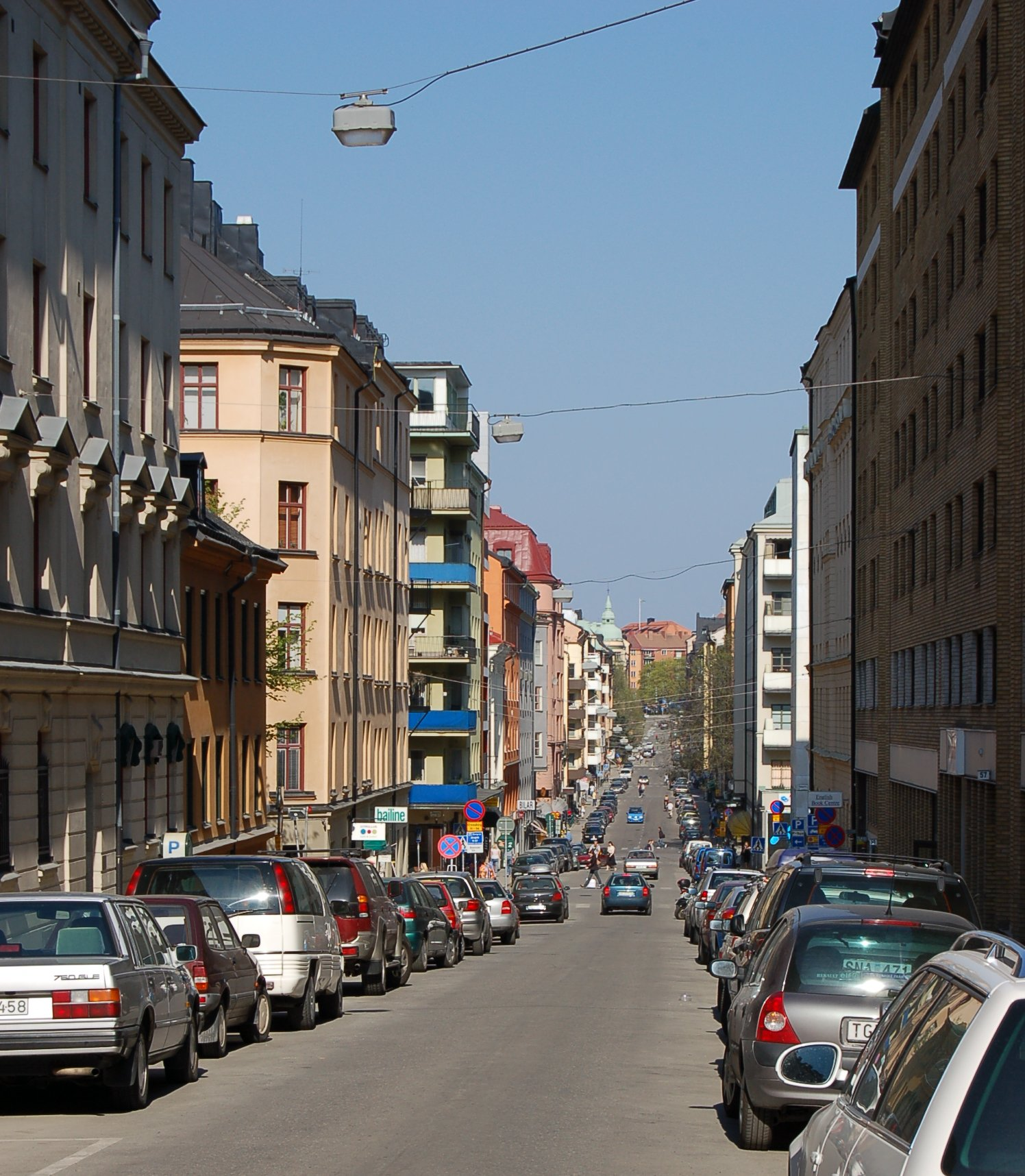 Stockholm: Surbrunnsgatan österut från Norrtullsgatan.